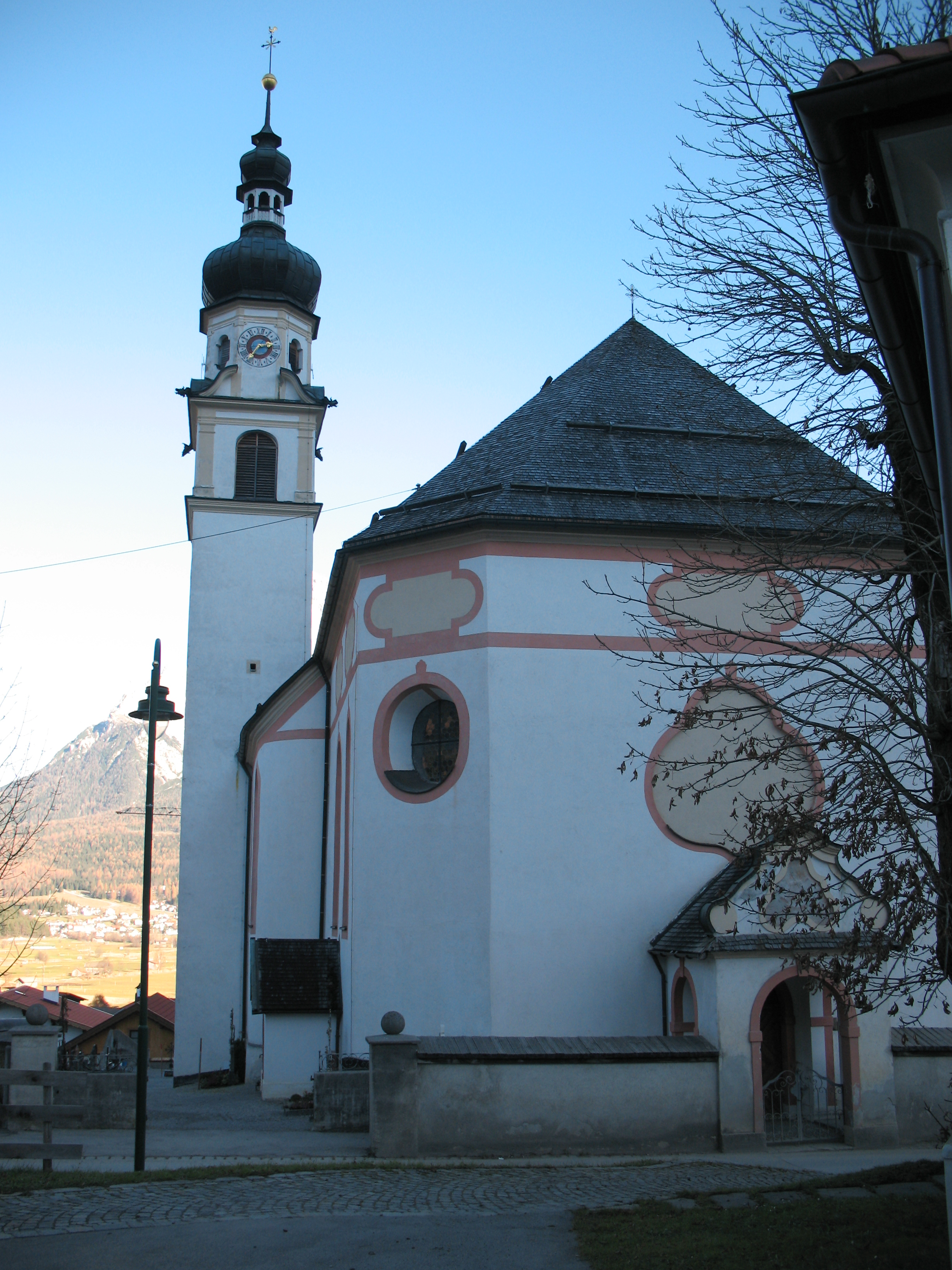 Kath. Pfarrkirche hl. Katharina, Friedhof